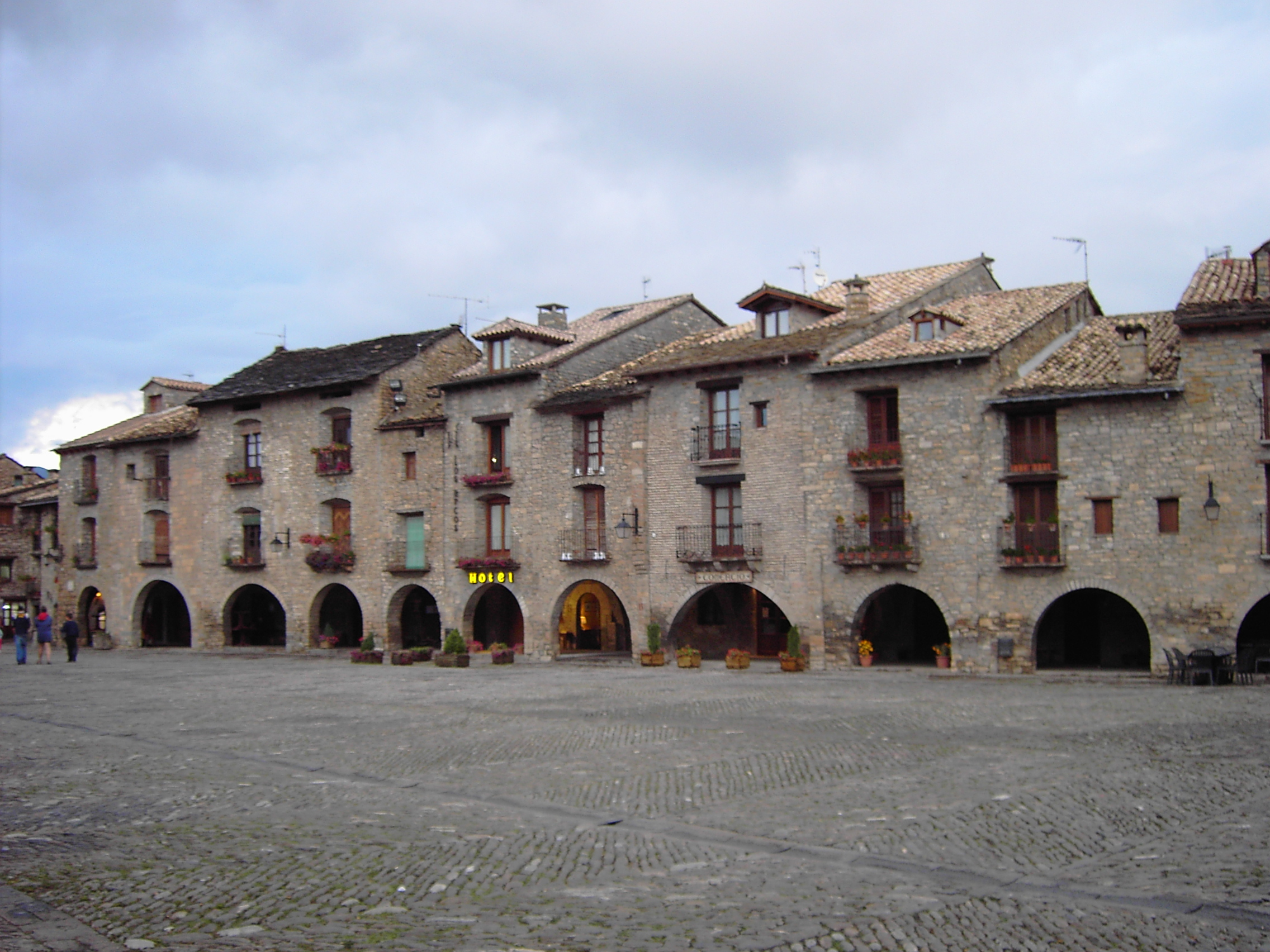 Plaza de l'Aínsa, en Sobrarbe, Huesca